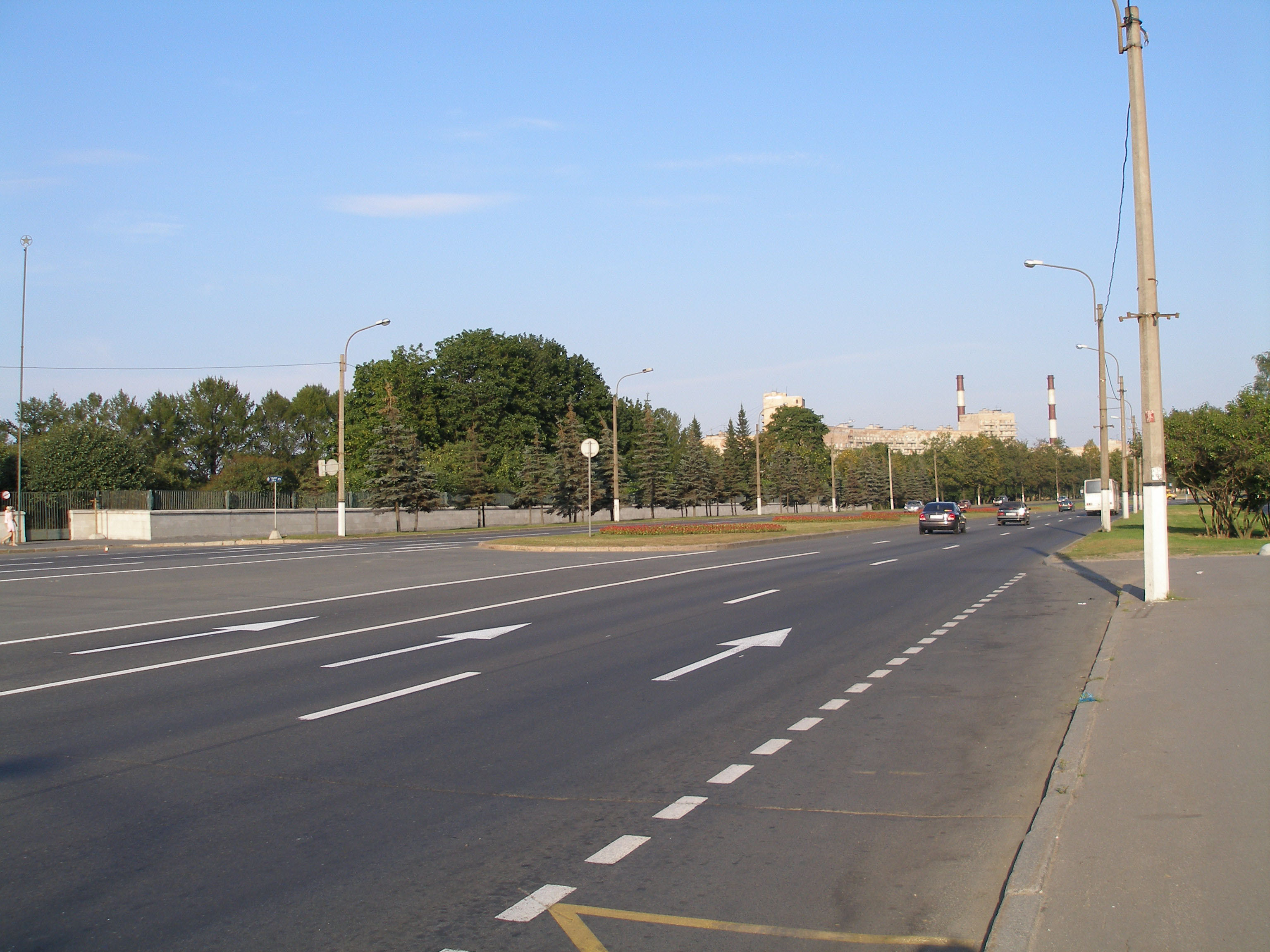 Проспект Непокорённых (Санкт-Петербург). Вид от Пискарёвского мемориального кладбища в сторону Пискарёвского проспекта